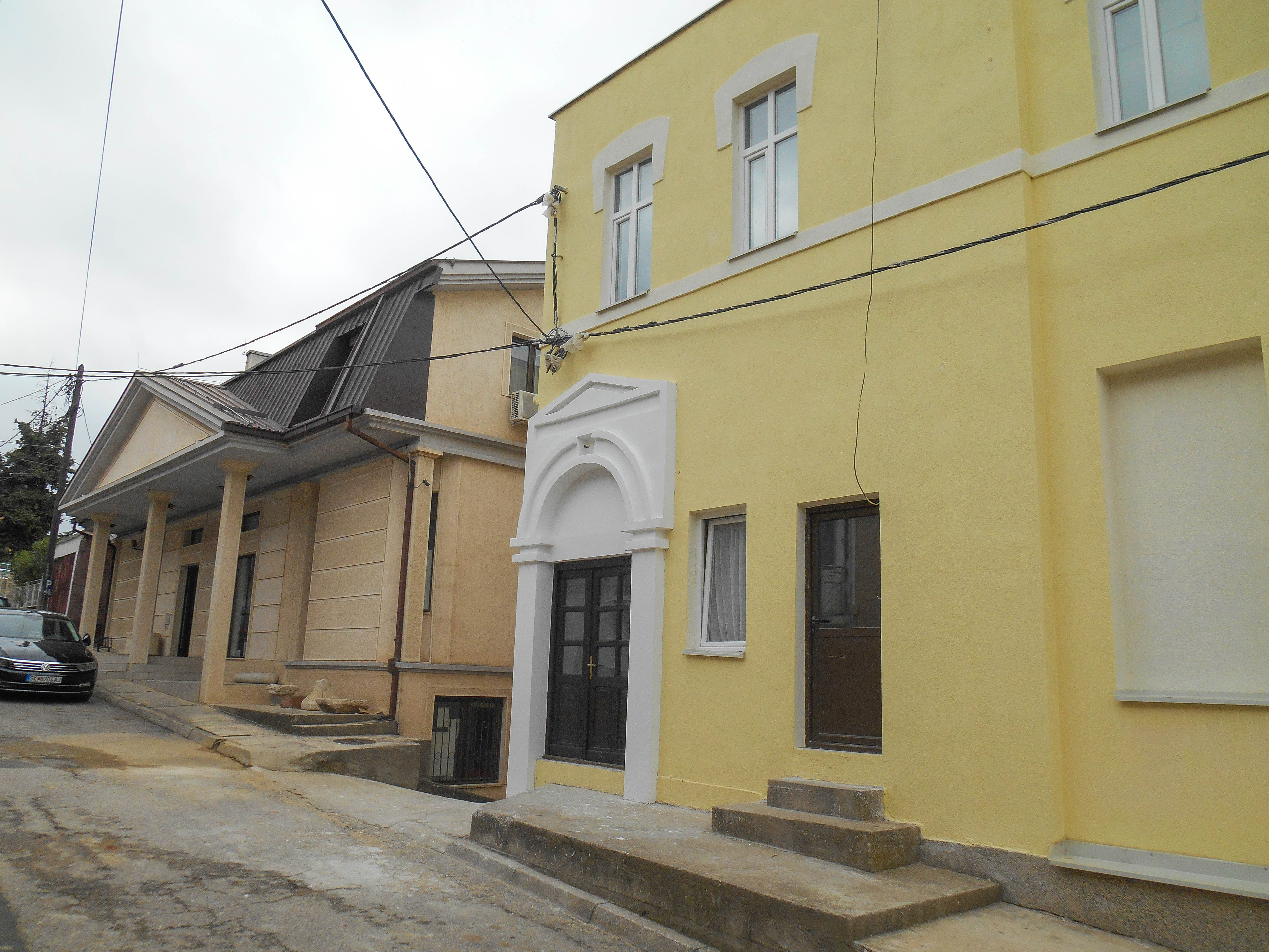 Завод за заштита на спомениците и Музеј - Струмица